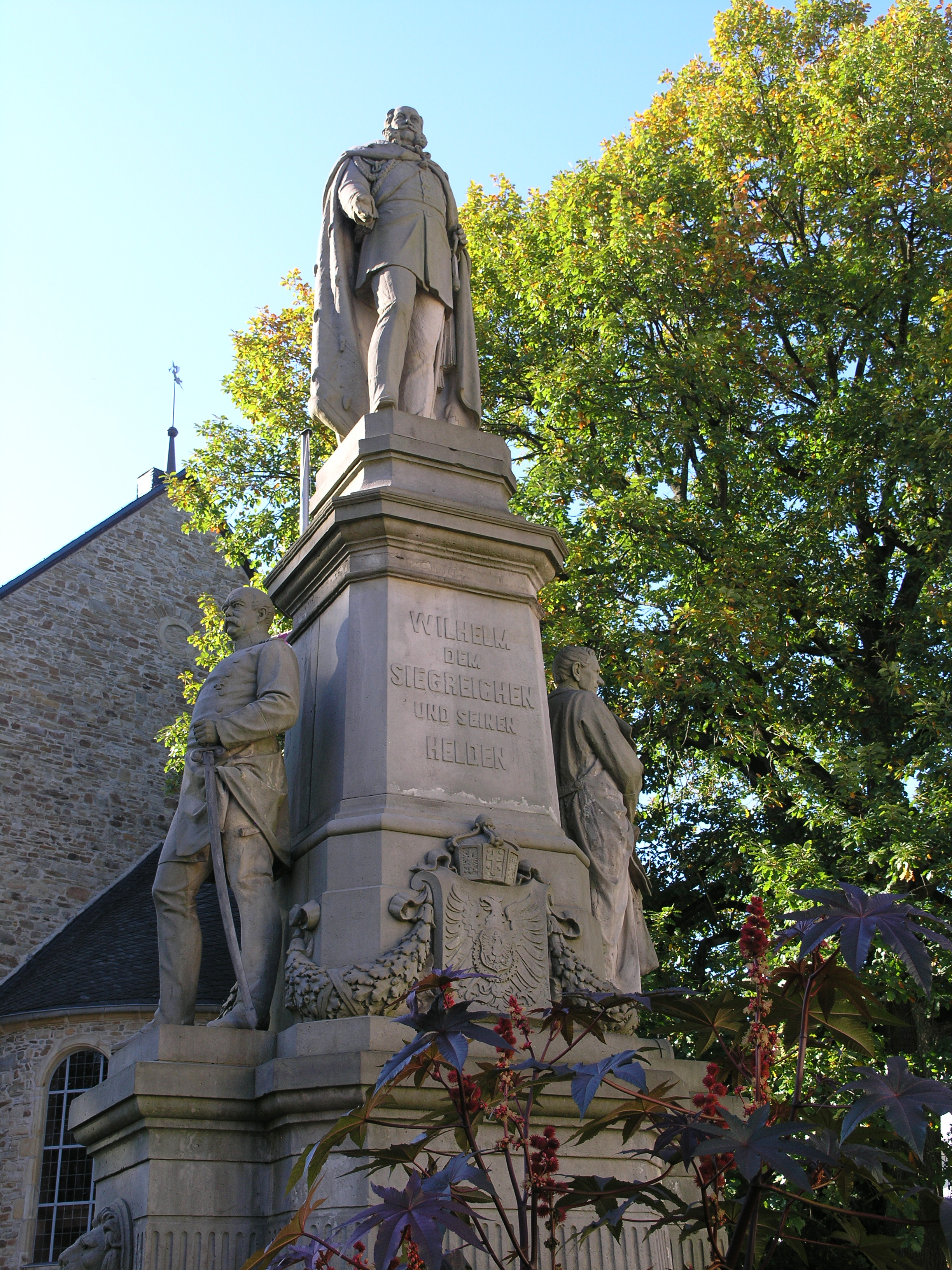 Северный Рейн - Вестфалия, Эссен, Кеттвиг - памятник Вильгельму I